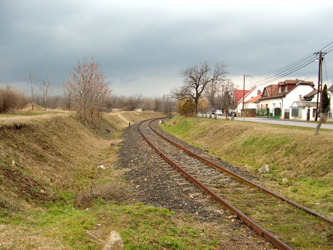 A Burma-vasút Szemeretelep közelében (Budapest)